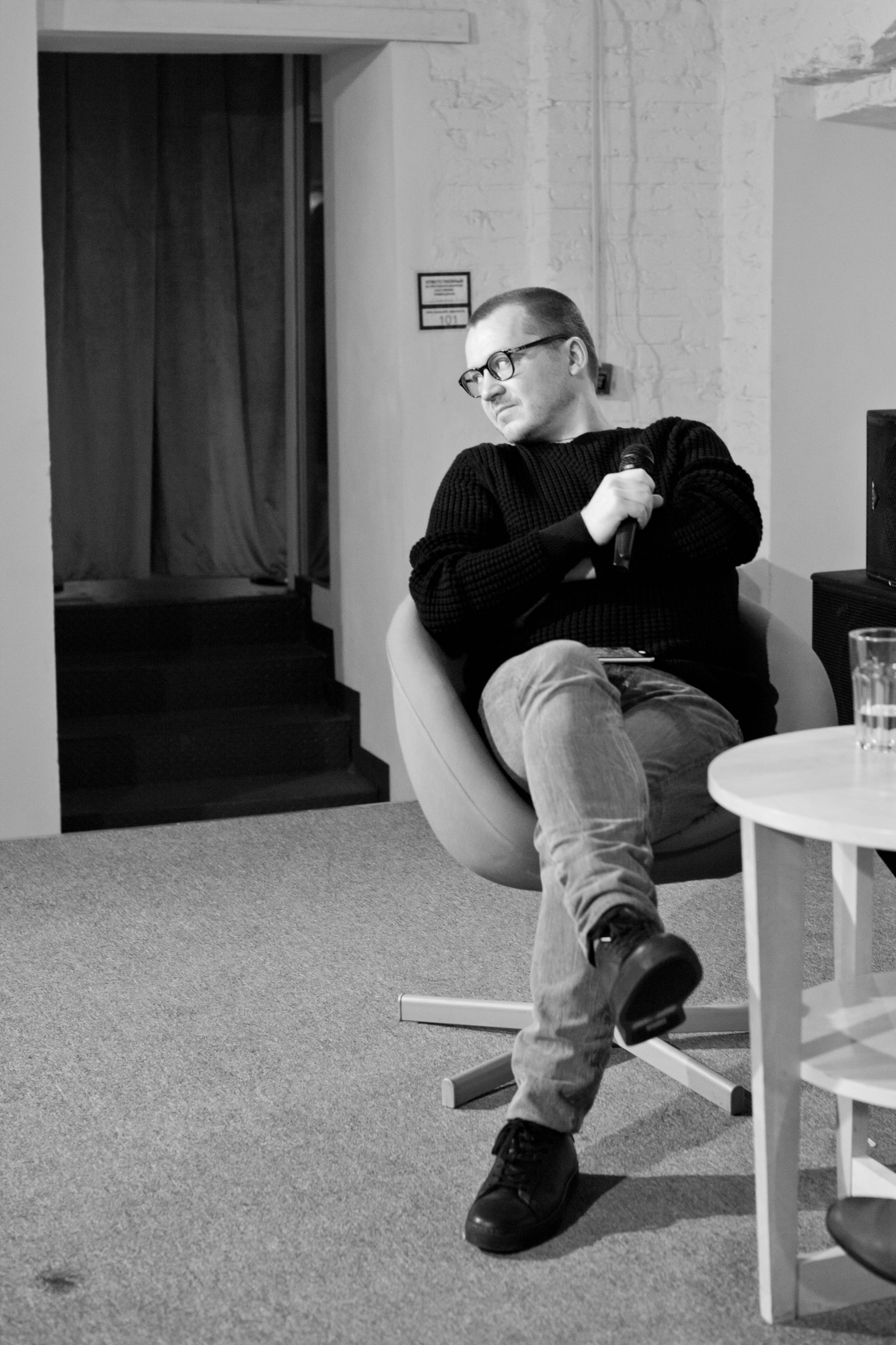 Публичное интервью с Романом Волобуевым и Алисой Хазановой (TheQuestion в Центре фотографии братьев Люмьер, Москва)